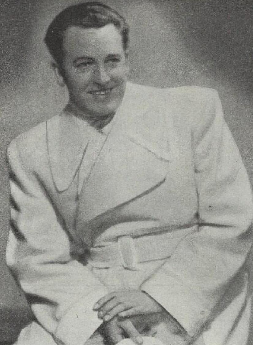 Zdeněk Hora (1903-?), český filmový a divadelní herec a operetní zpěvák